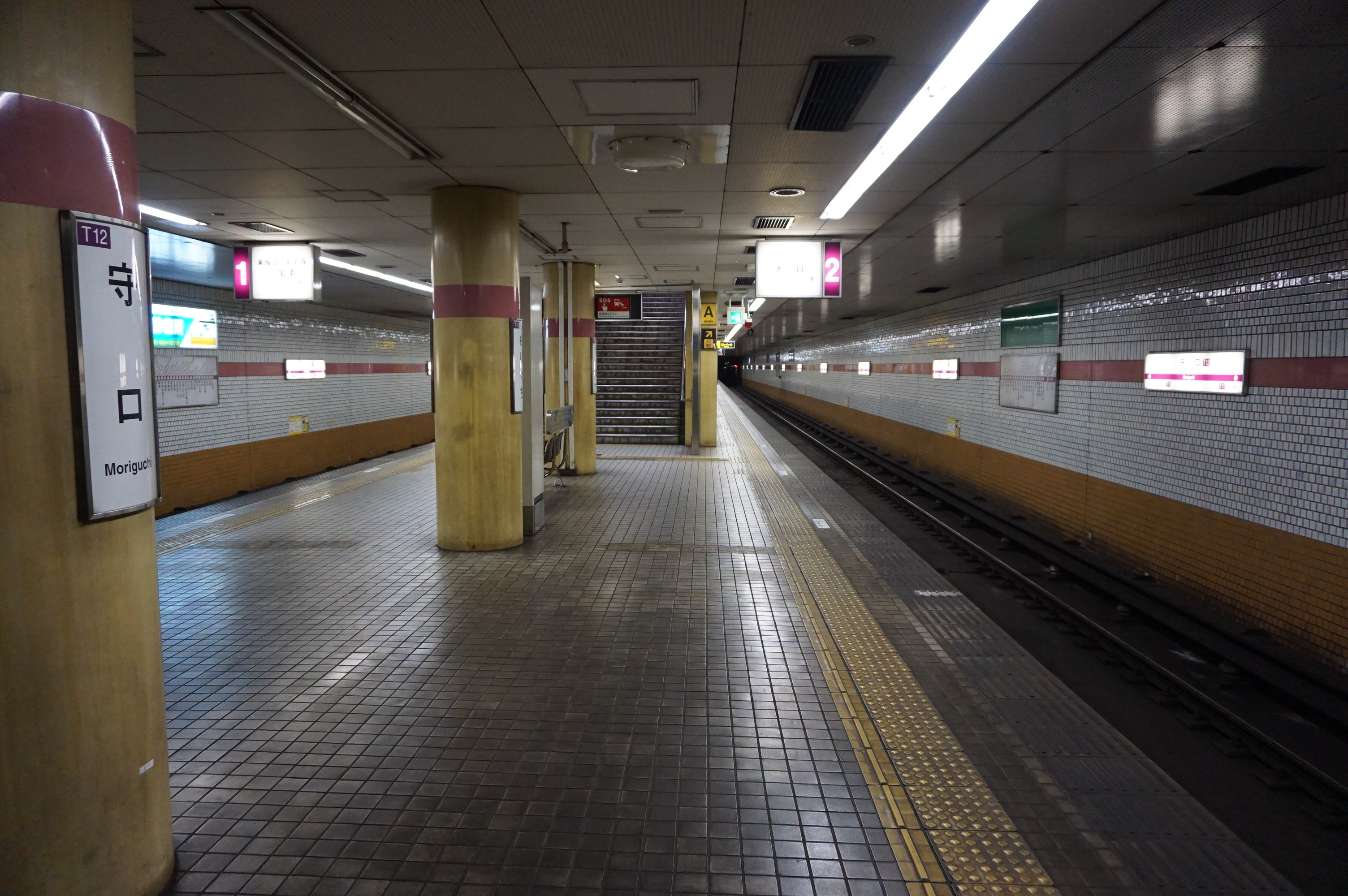 ホーム（2018年5月）